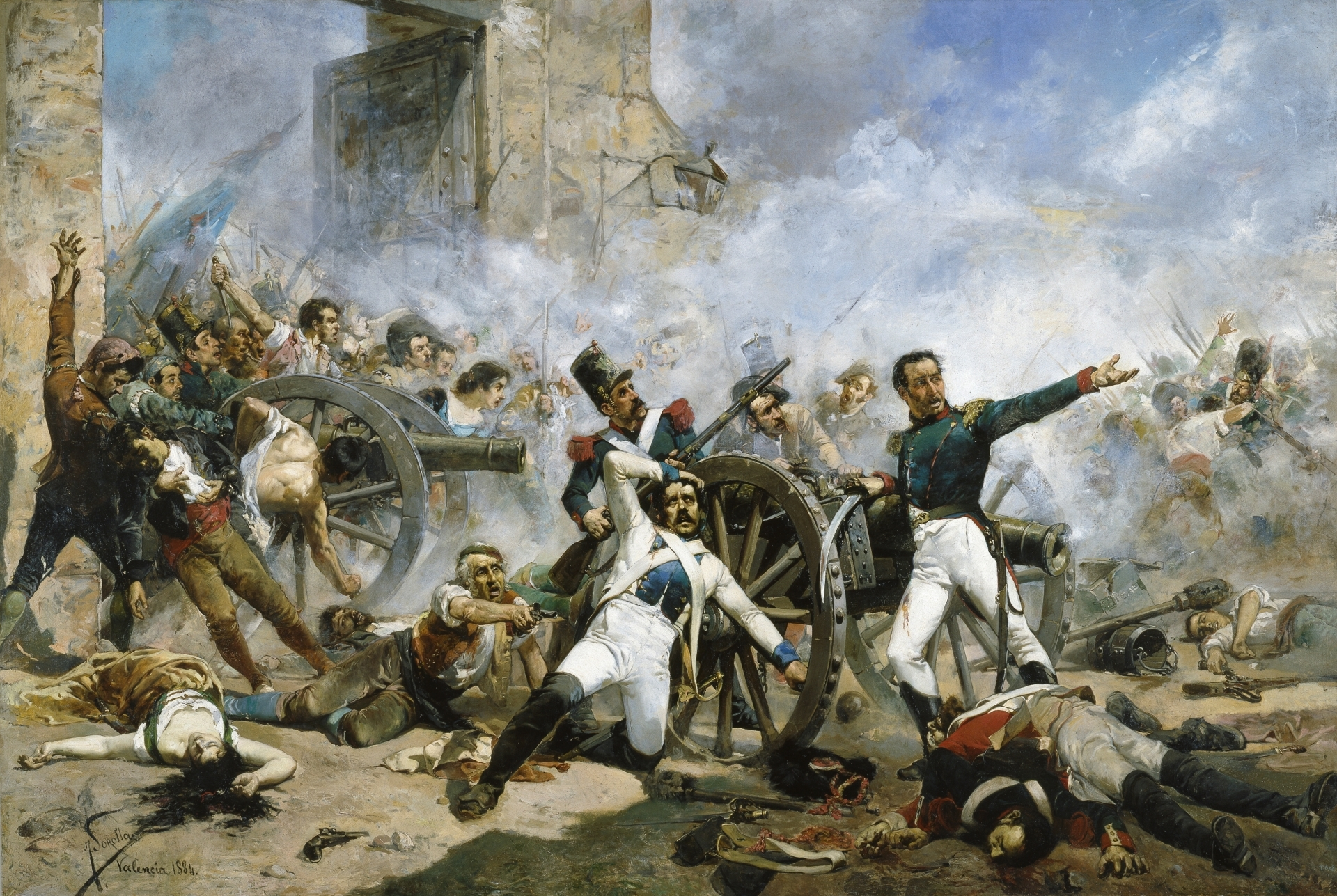 Defensa del Parque de Artillería de Monteleón, en Madrid, por las tropas al mando de Luís Daoiz (1767-1808) y Pedro Velarde (1779-1808). el 2 de mayo de 1808, contra los soldados franceses, en el inicio de la Guerra de la Independencia (1808-1814)